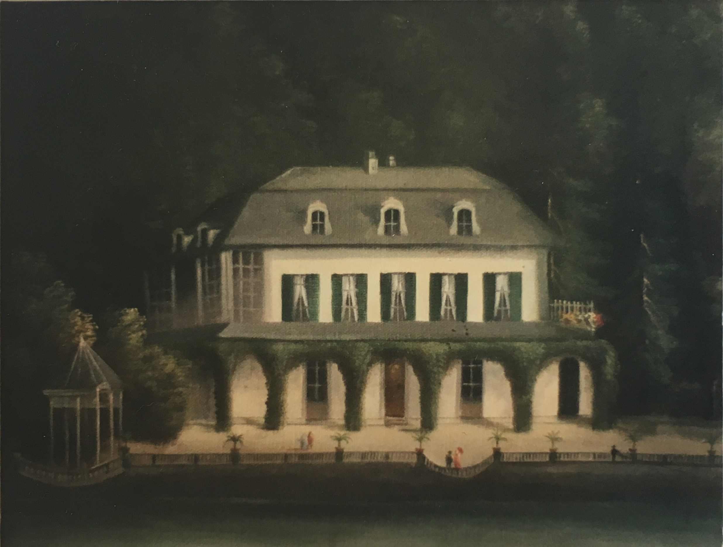 Oberhofen am Thunersee, Villa Jenner (Schoren 7).